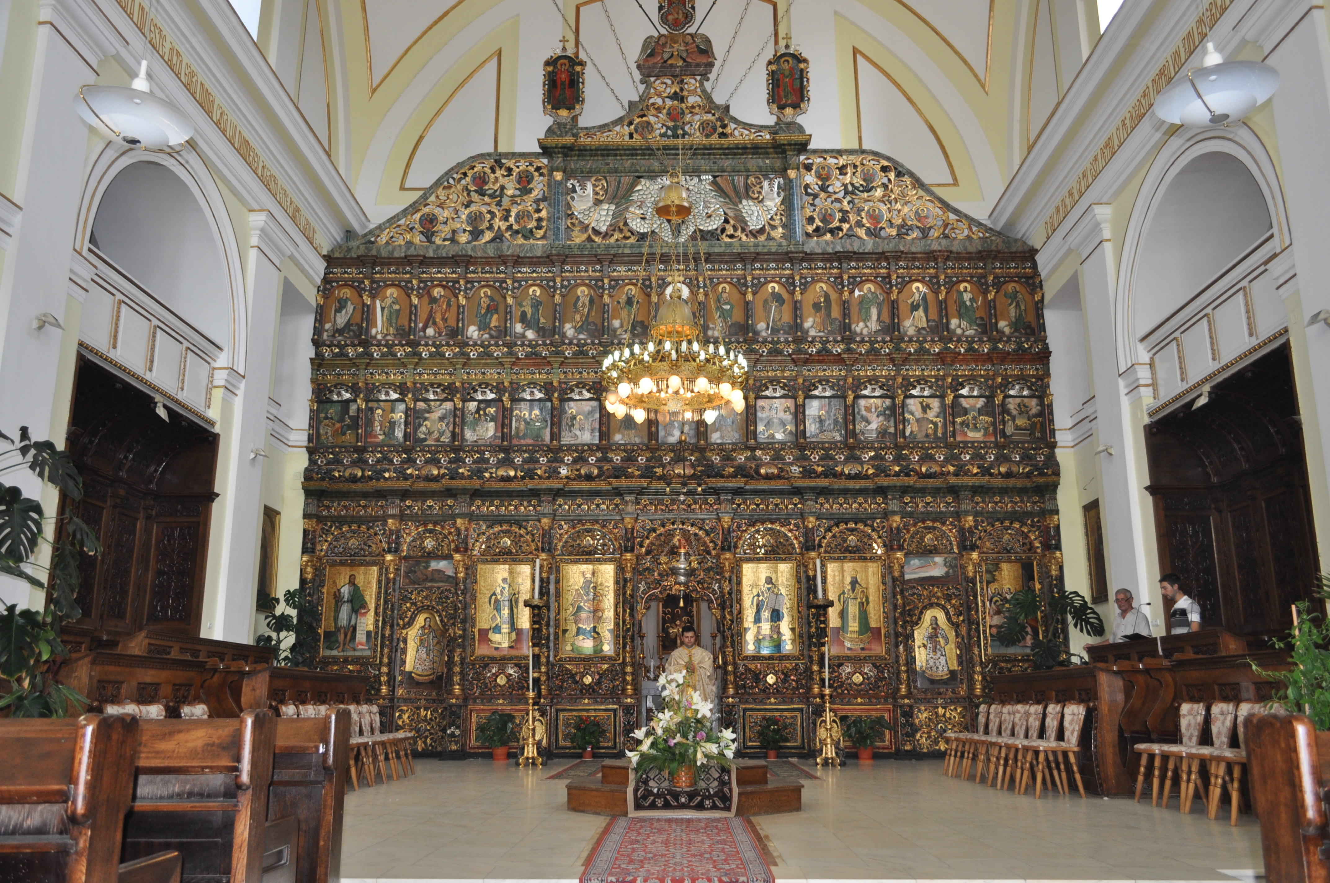 Catedrala Mitropolitană Greco-Catolică „Sfânta Treime” din Blaj